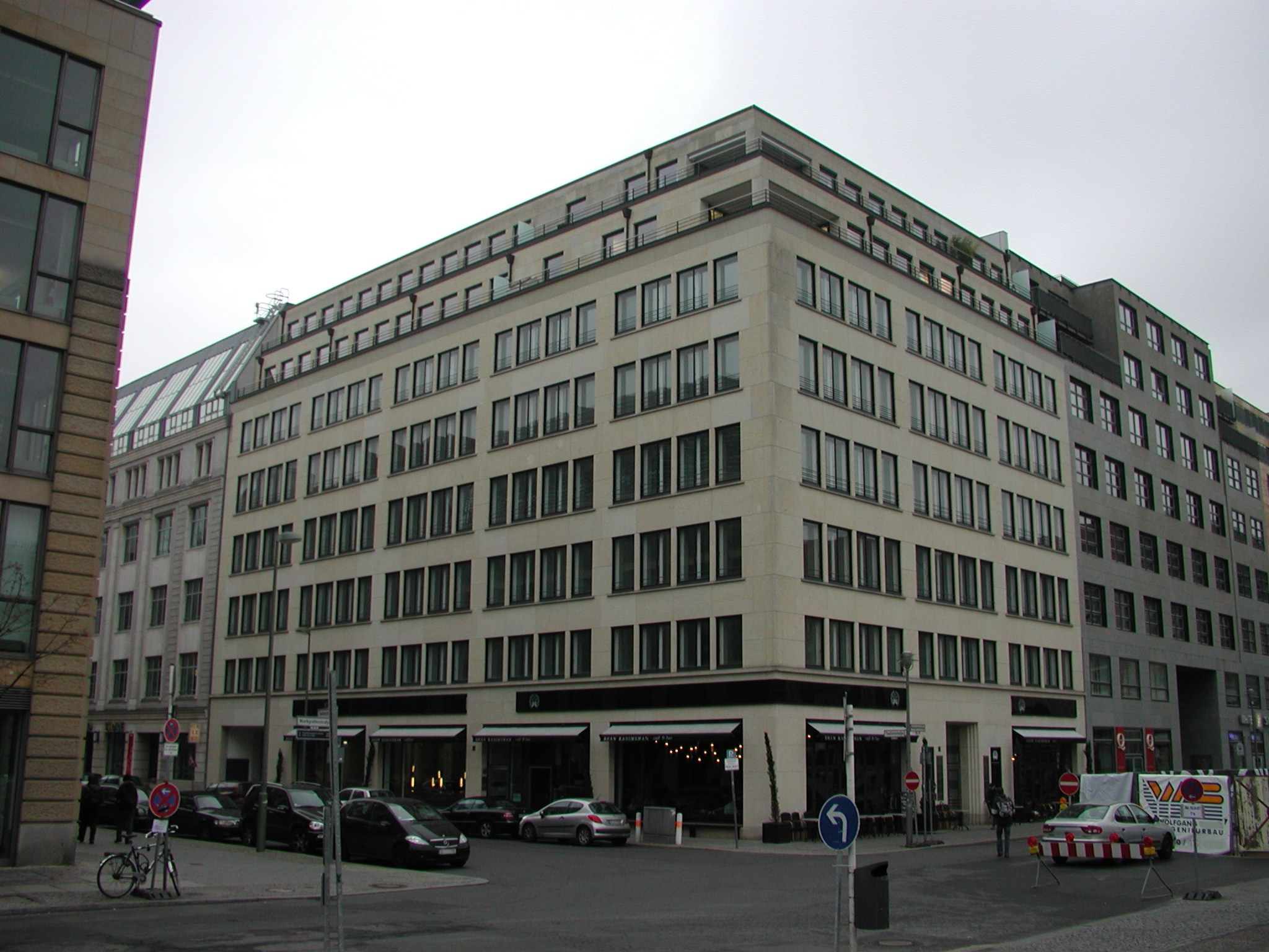 Markgrafenblock (Nr. 36) in Berlin, Architekt: Josef Paul Kleihues, Berlin